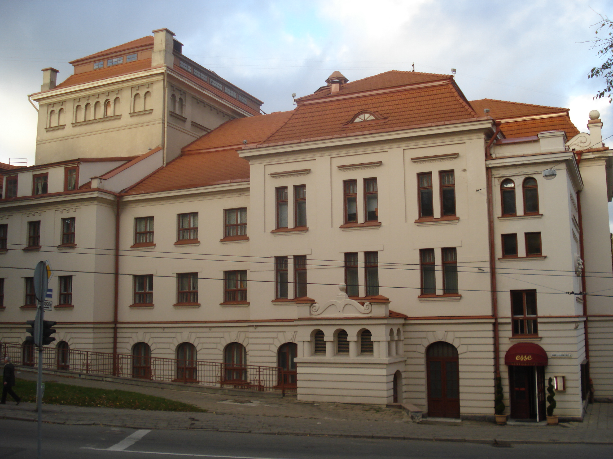 Russian Drama Theatre in Vilnius (J. Basanavičiaus g. 13)